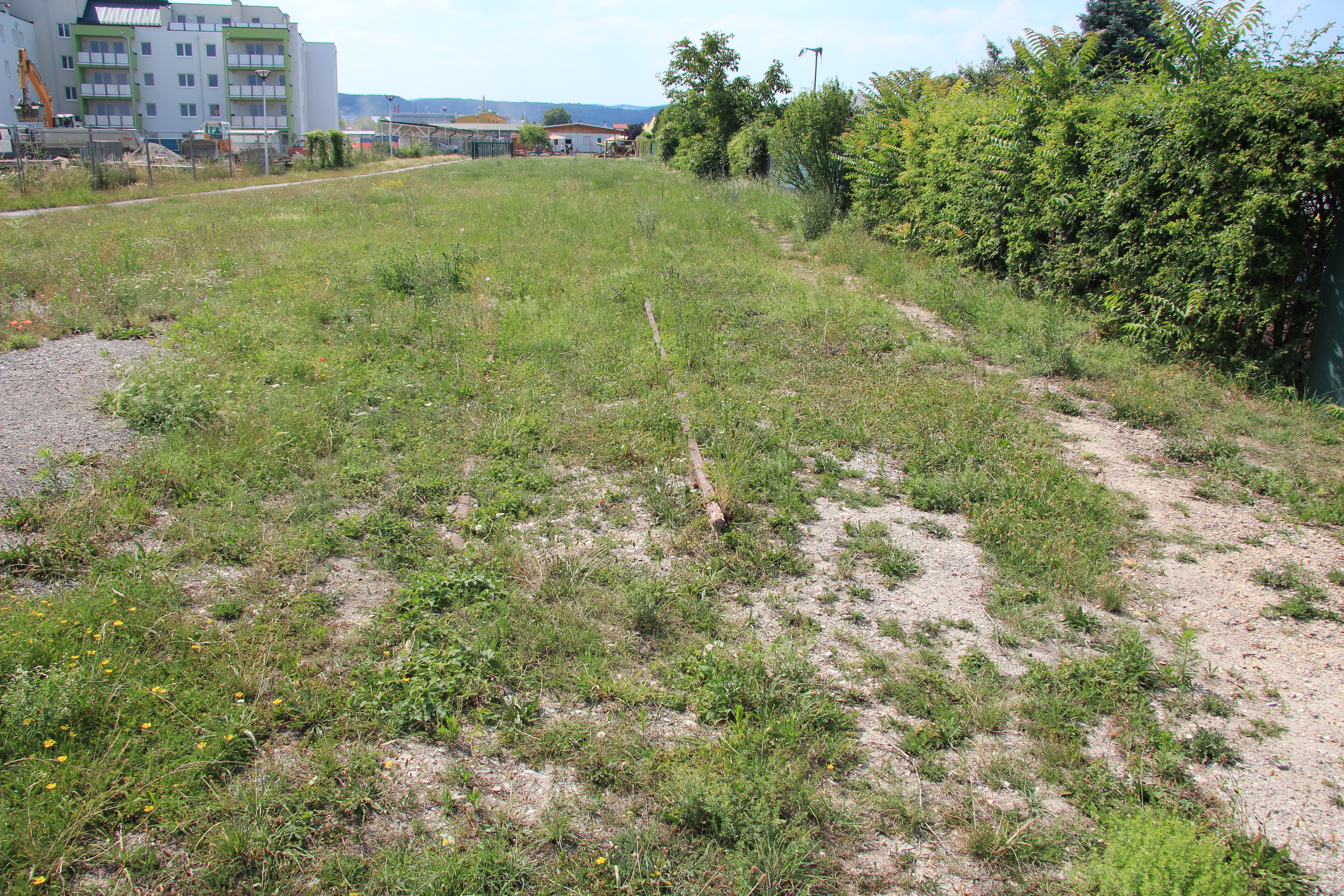 Schienenreste der Laxenburgerbahn in Wiener Neudorf